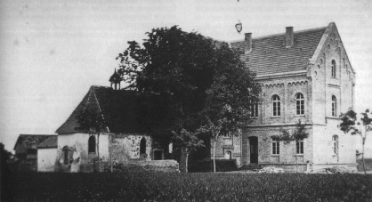 Lazaruskapelle (1883 abgebrochen) auf dem Gelände des heutigen Redemptoristenklosters Josefhöhe, Kölnstraße, Bonn